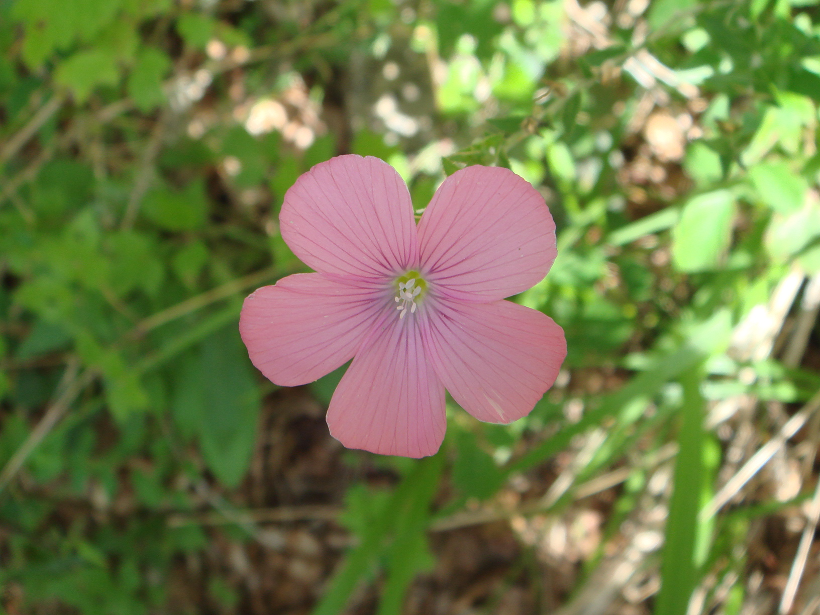 Linum viscosum, Valle de Añisclo, Pirineos (Huesca), España